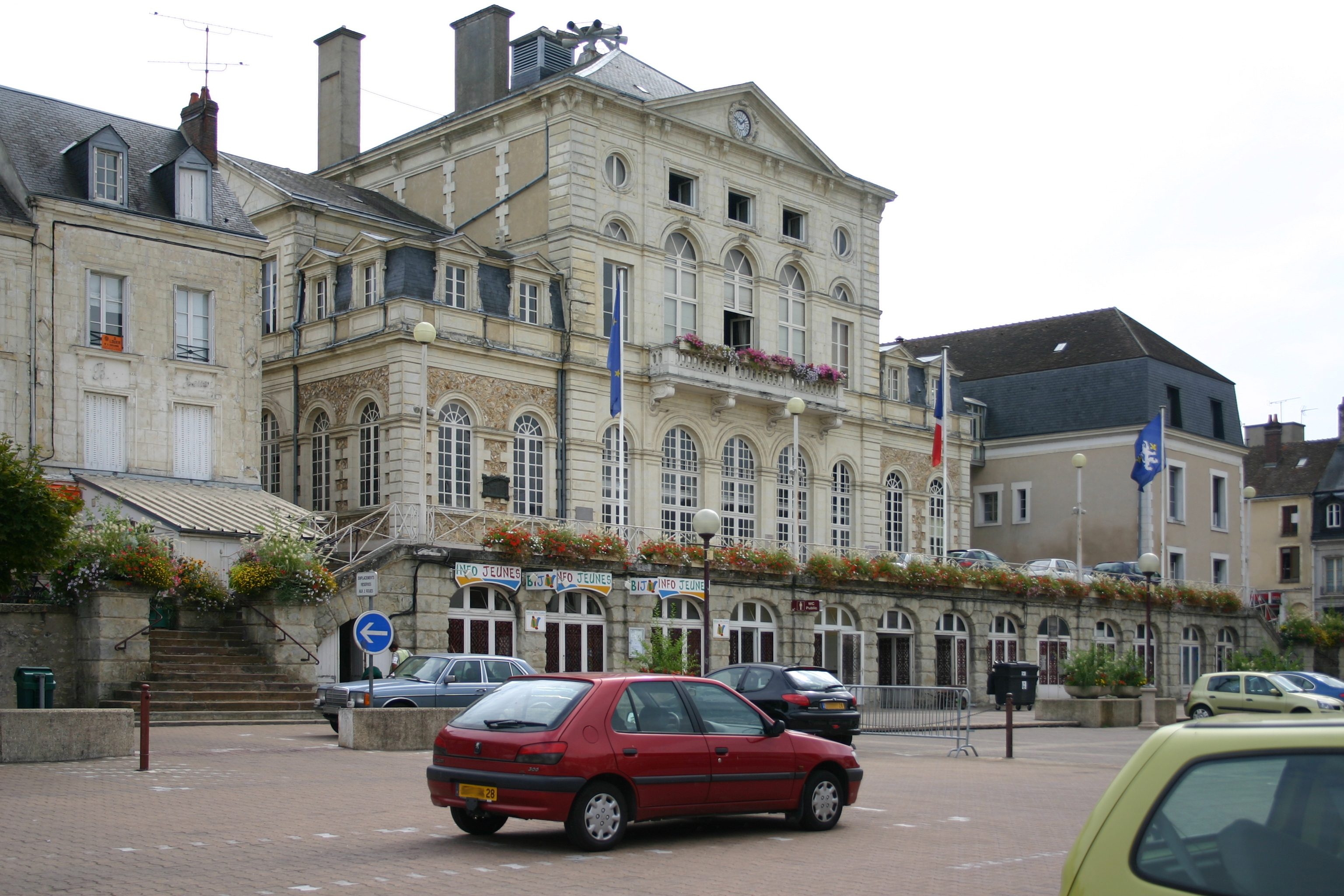 Hôtel de ville, dans le centre ville de Nogent-le-Rotrou.